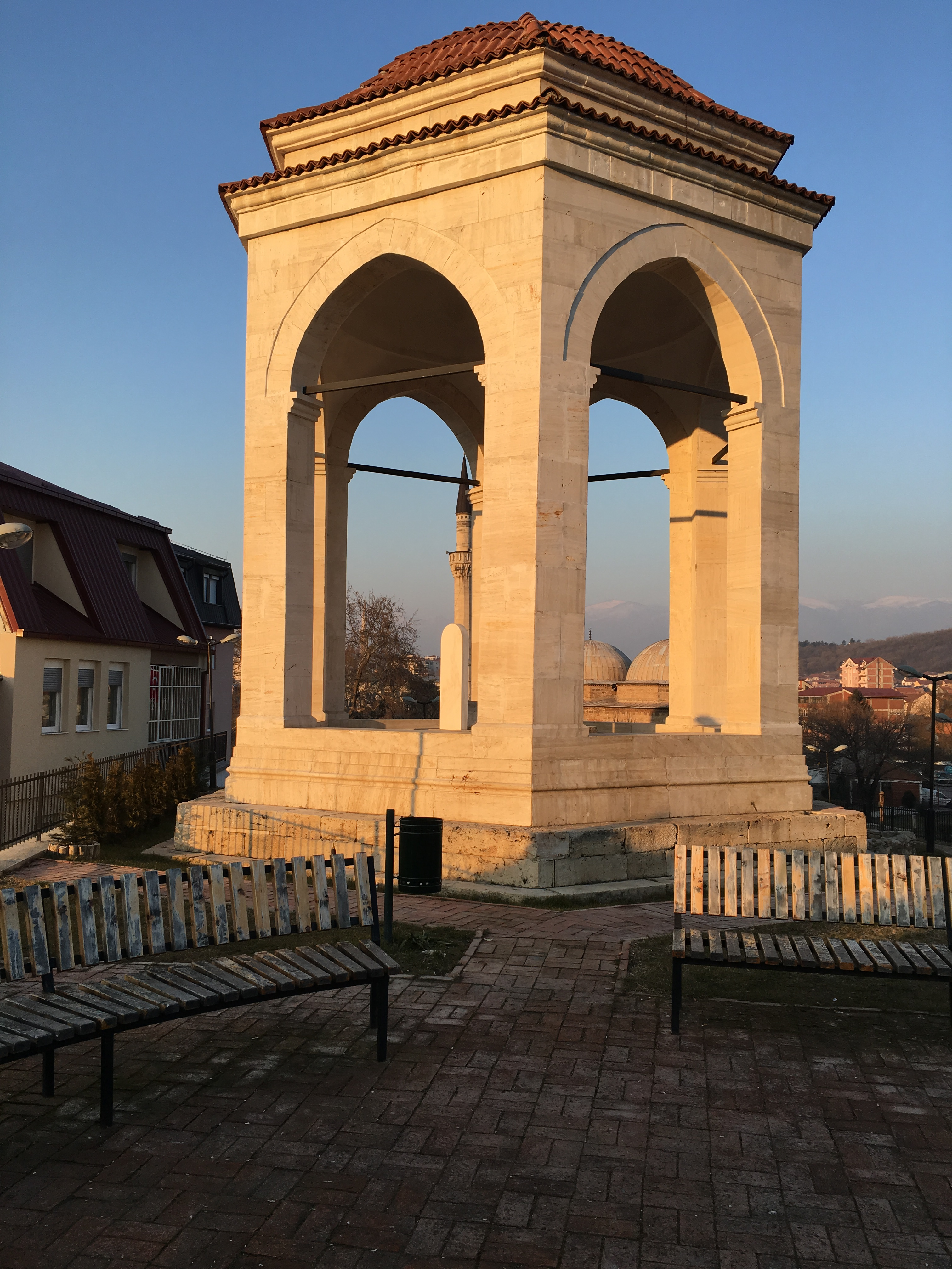 Турбе на Исхак-бег во Скопје